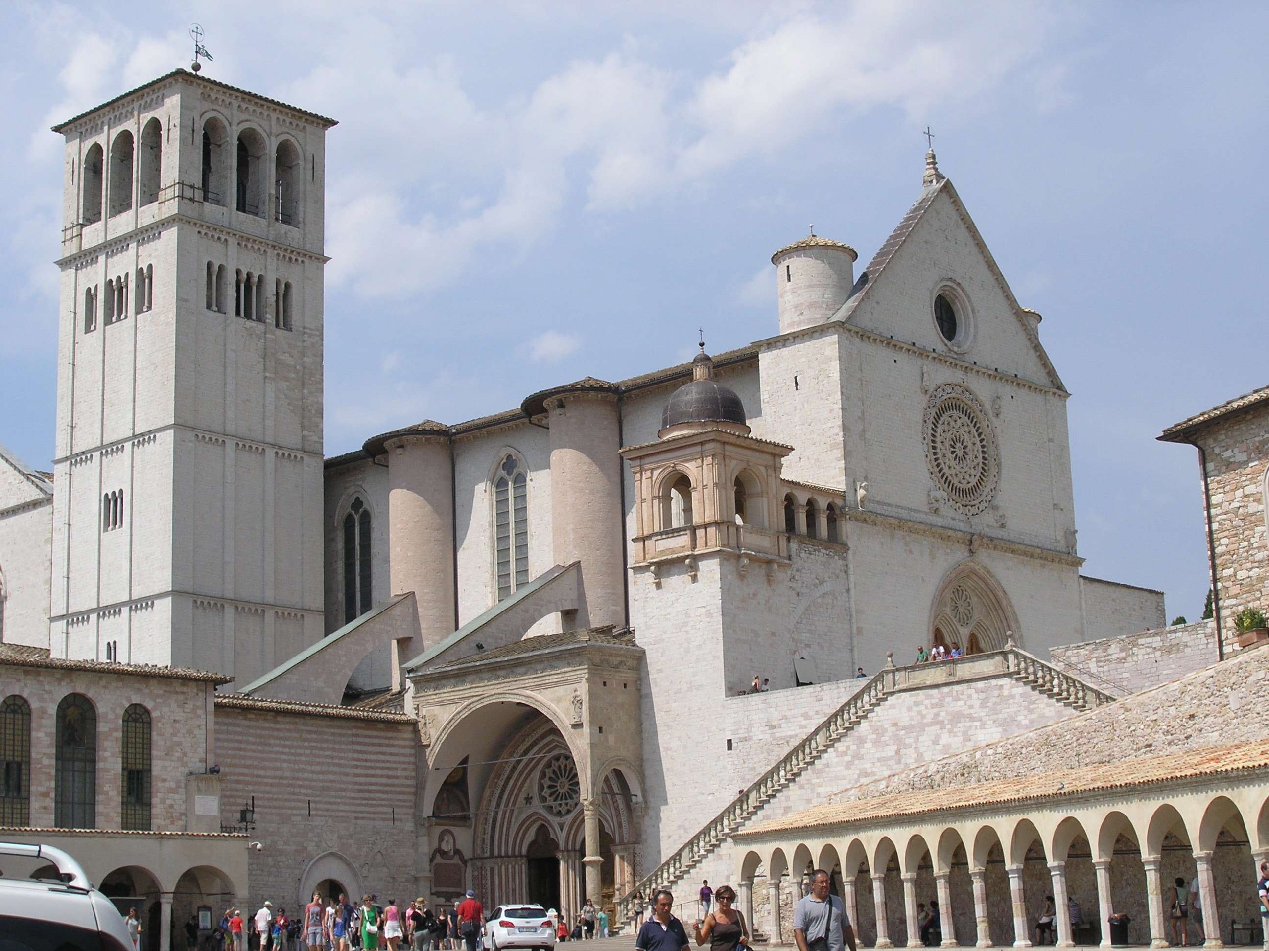 Die Basilica San Francesco in Assisi, Italien.